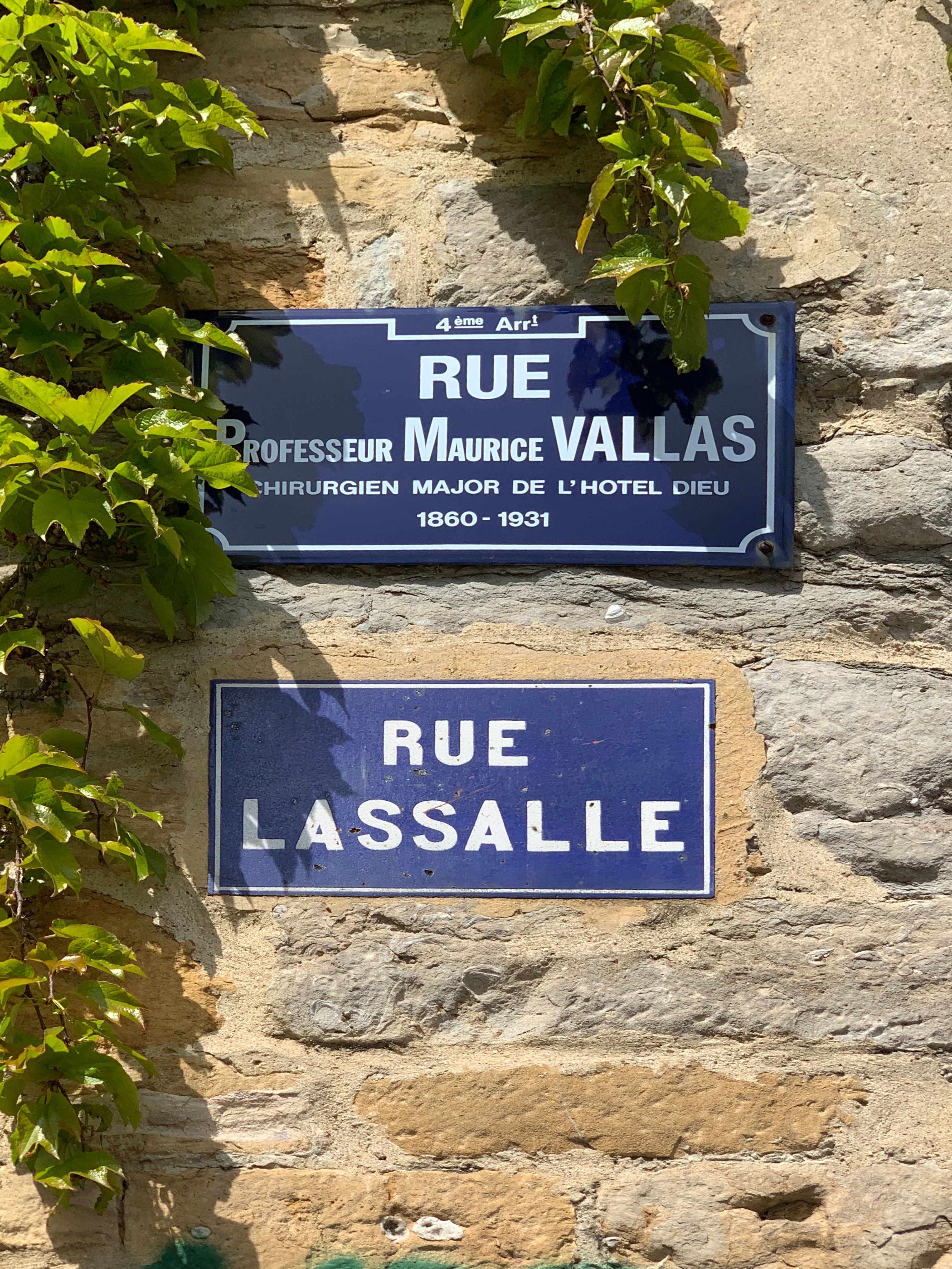 Rue Professeur Maurice Vallas (Lyon). en (avril 2019).